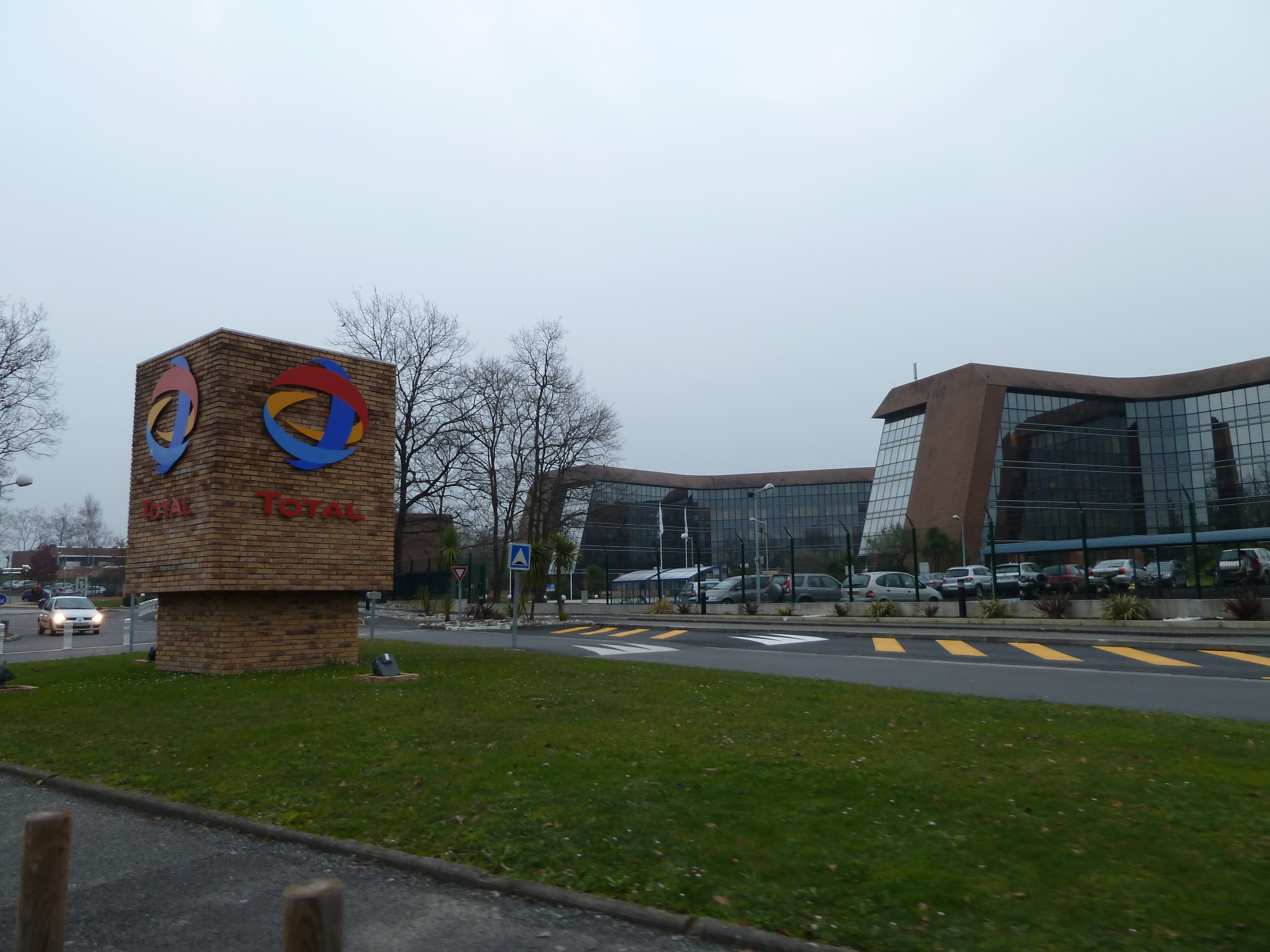 Centre scientifique et technique Jean Féger